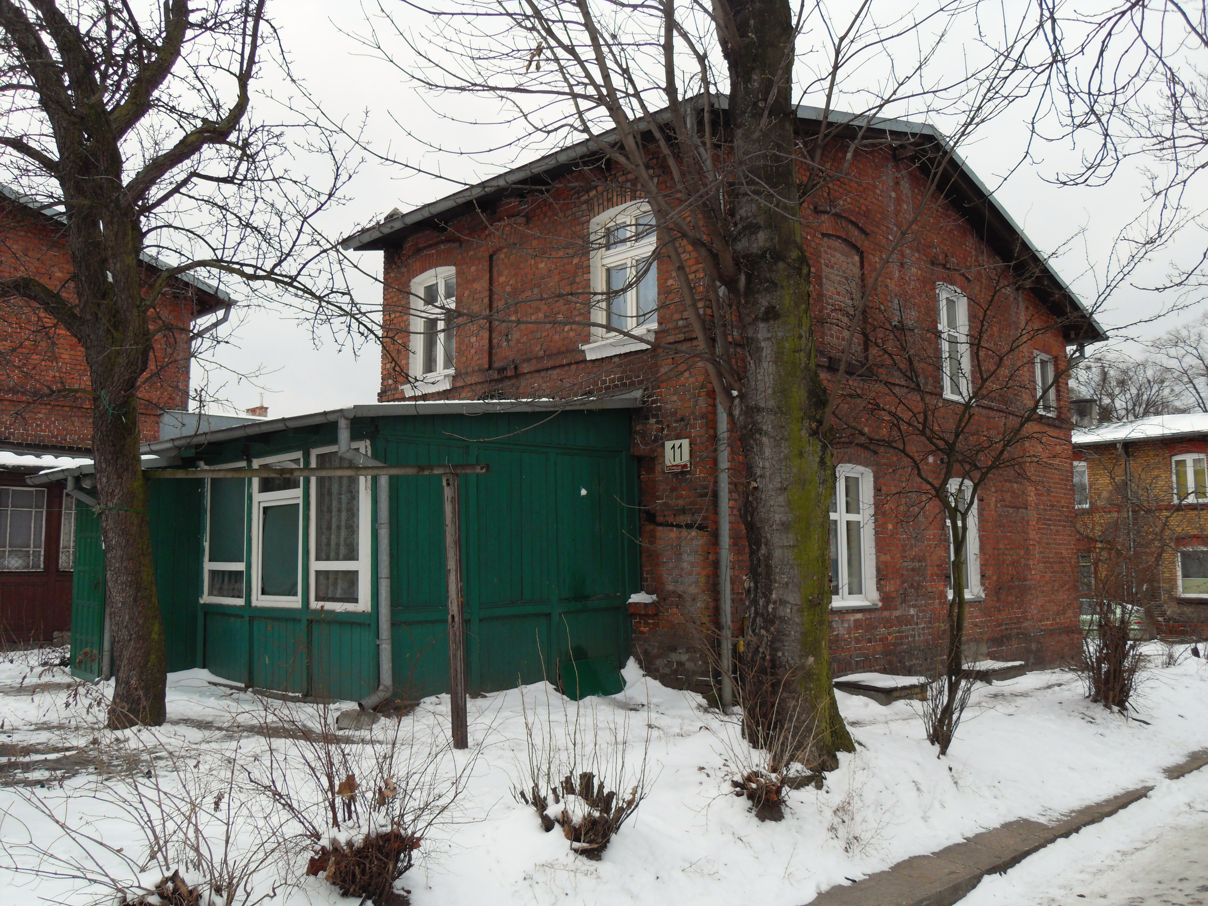 Gdańsk Wrzeszcz, ul. Kolejarzy 11. Miejsce, gdzie powstał zespół Kombi (ówcześnie pod nazwą Akcenty).